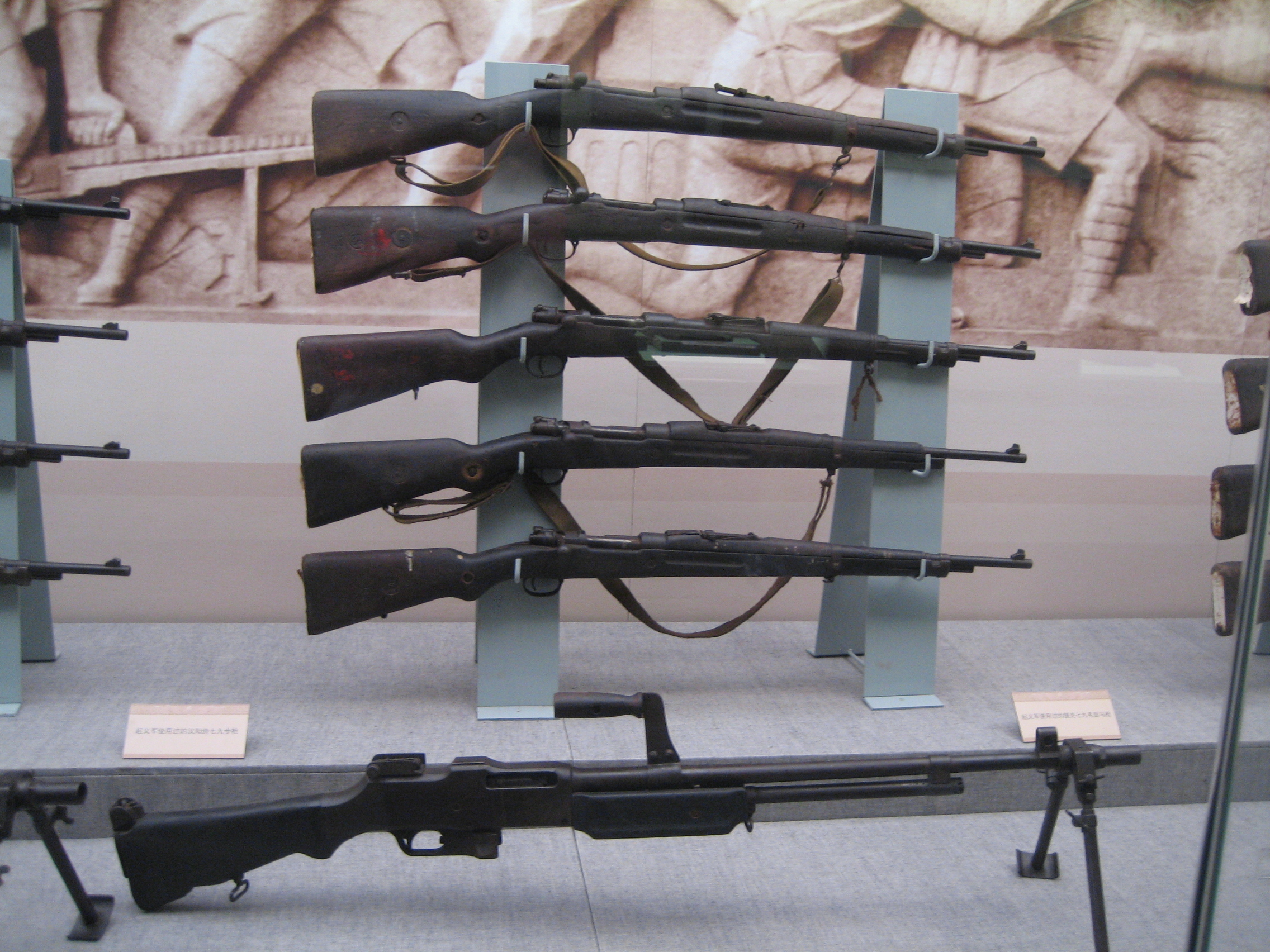 南昌起义部队使用的毛瑟M1924步枪和勃朗宁M1918自动步枪